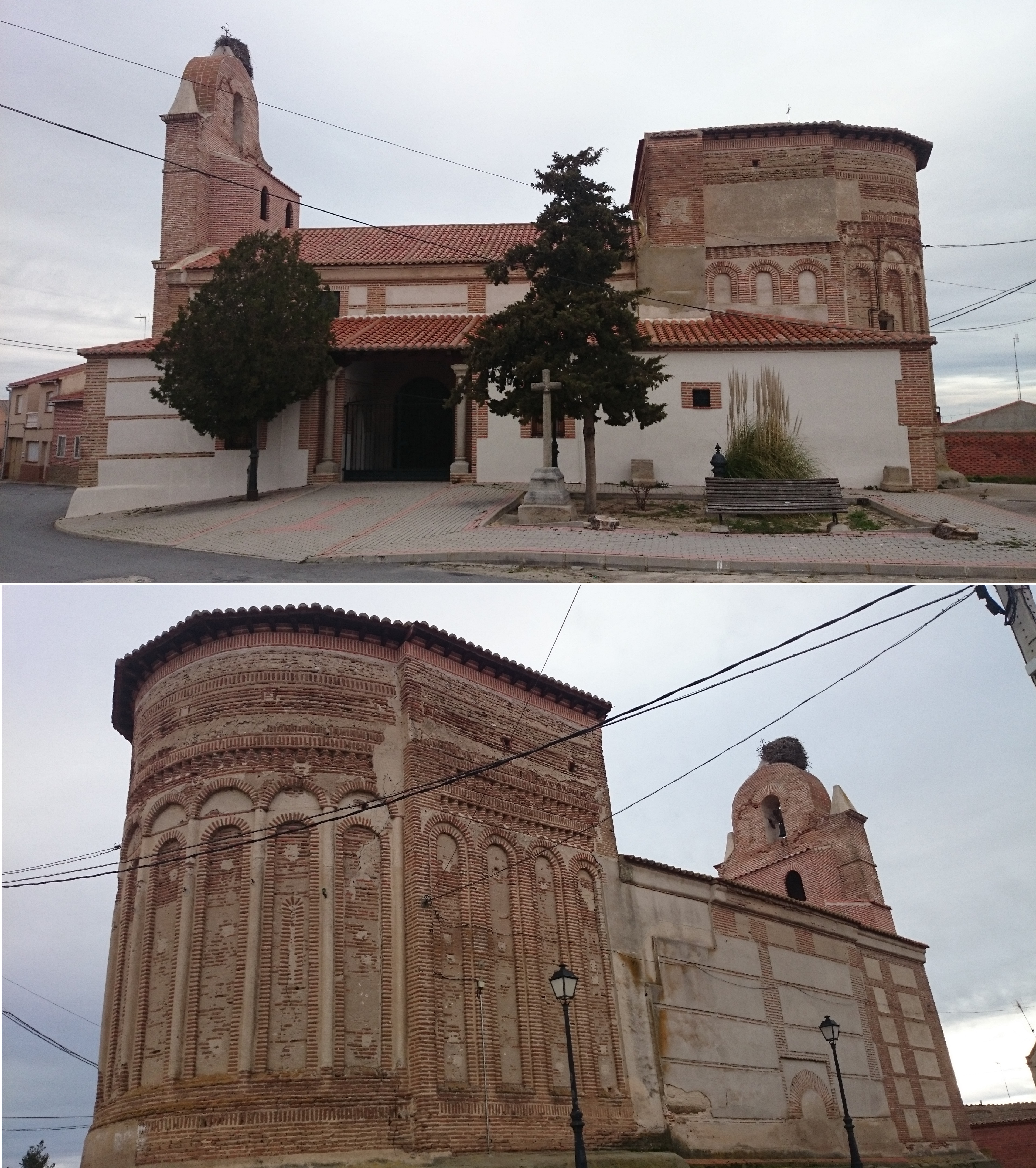 Iglesia San Pedro Apostol, Pedro Rodríguez